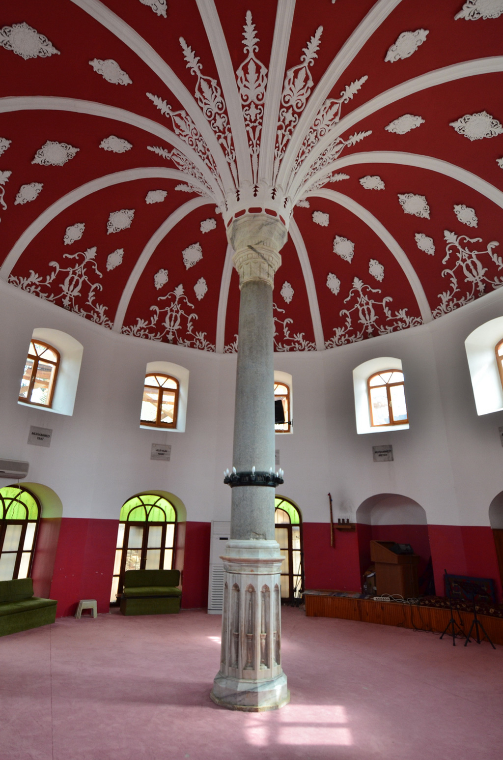 Şahkulu Sultan Dergahi Cemevi, ein sehr altes Gebetshaus